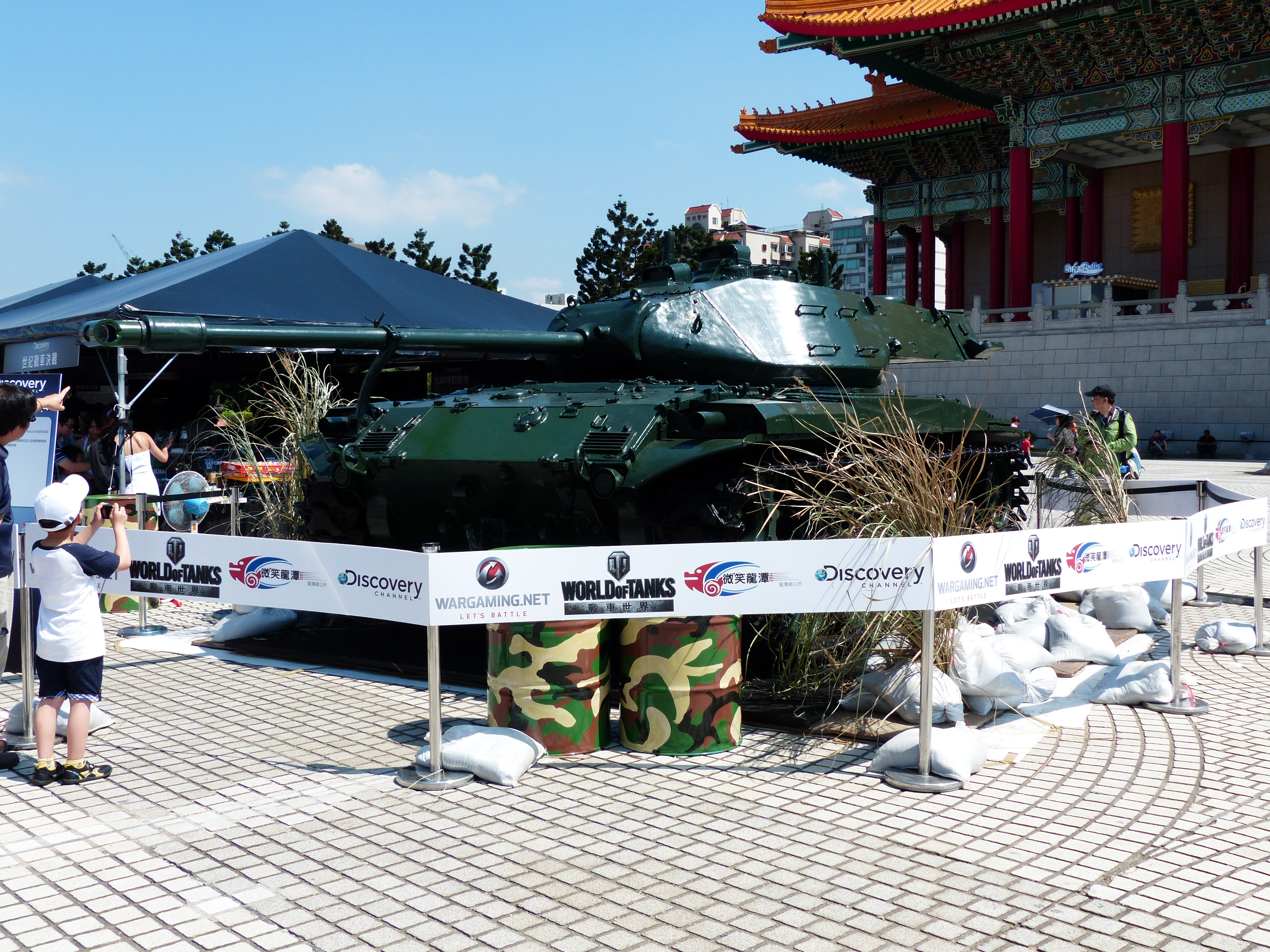 Discovery特戰部隊體驗展，國家戲劇院前的《戰車世界》特設攤位與其旁展示陸軍M41A3輕戰車。